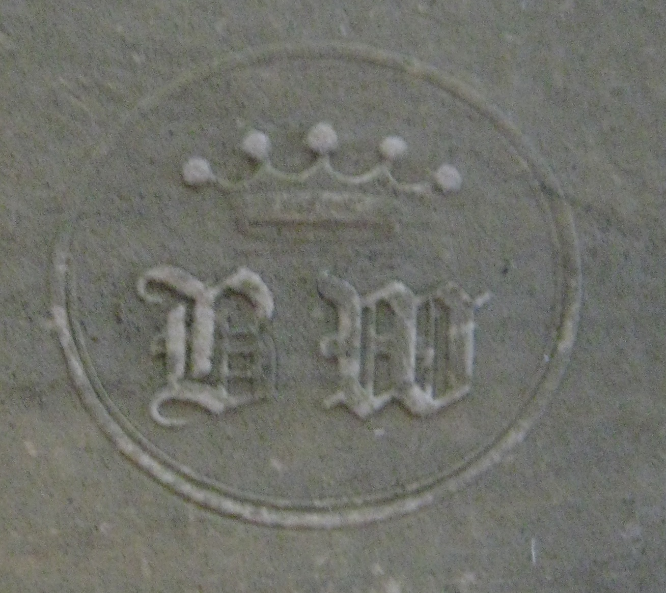 Маркировочный оттиск Бенджамина Вольфа